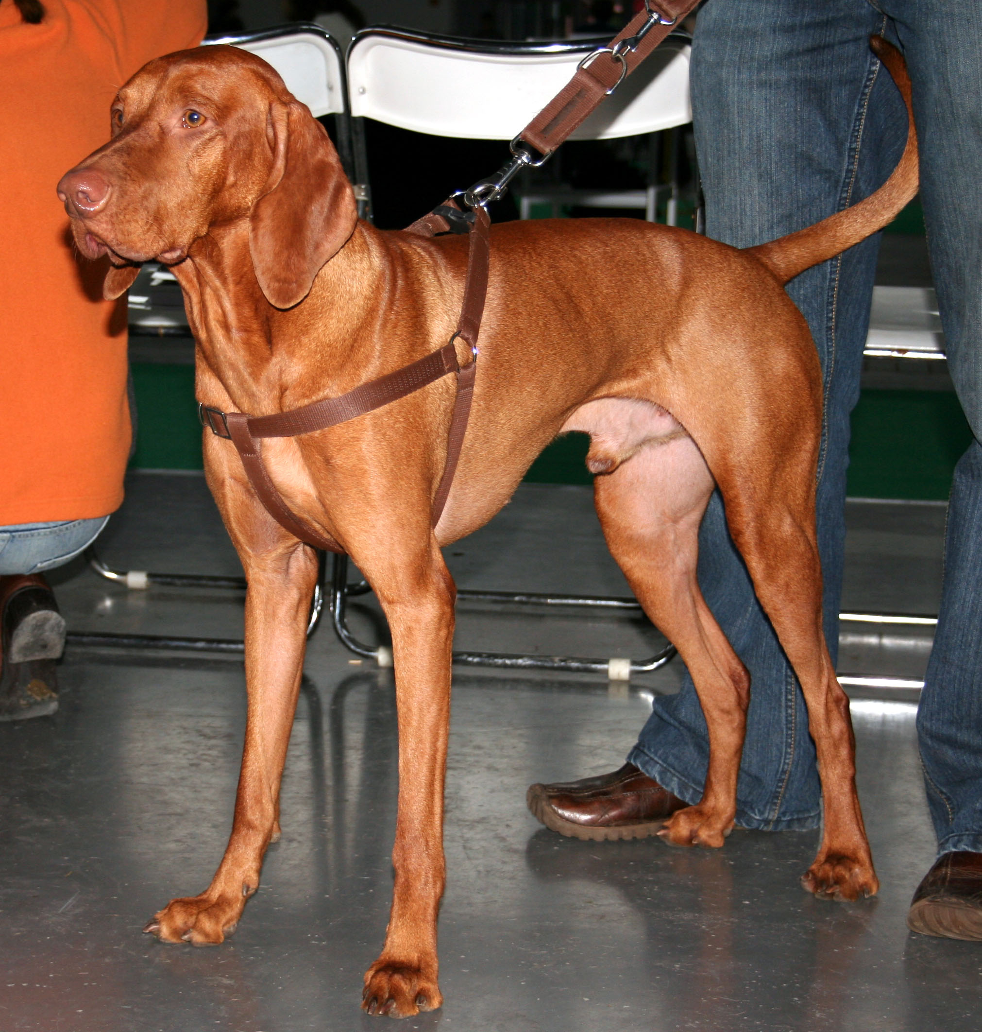 Wyżeł_węgierski_gładkowłosy na Światowej Wystawie Psów Rasowych w Poznaniu